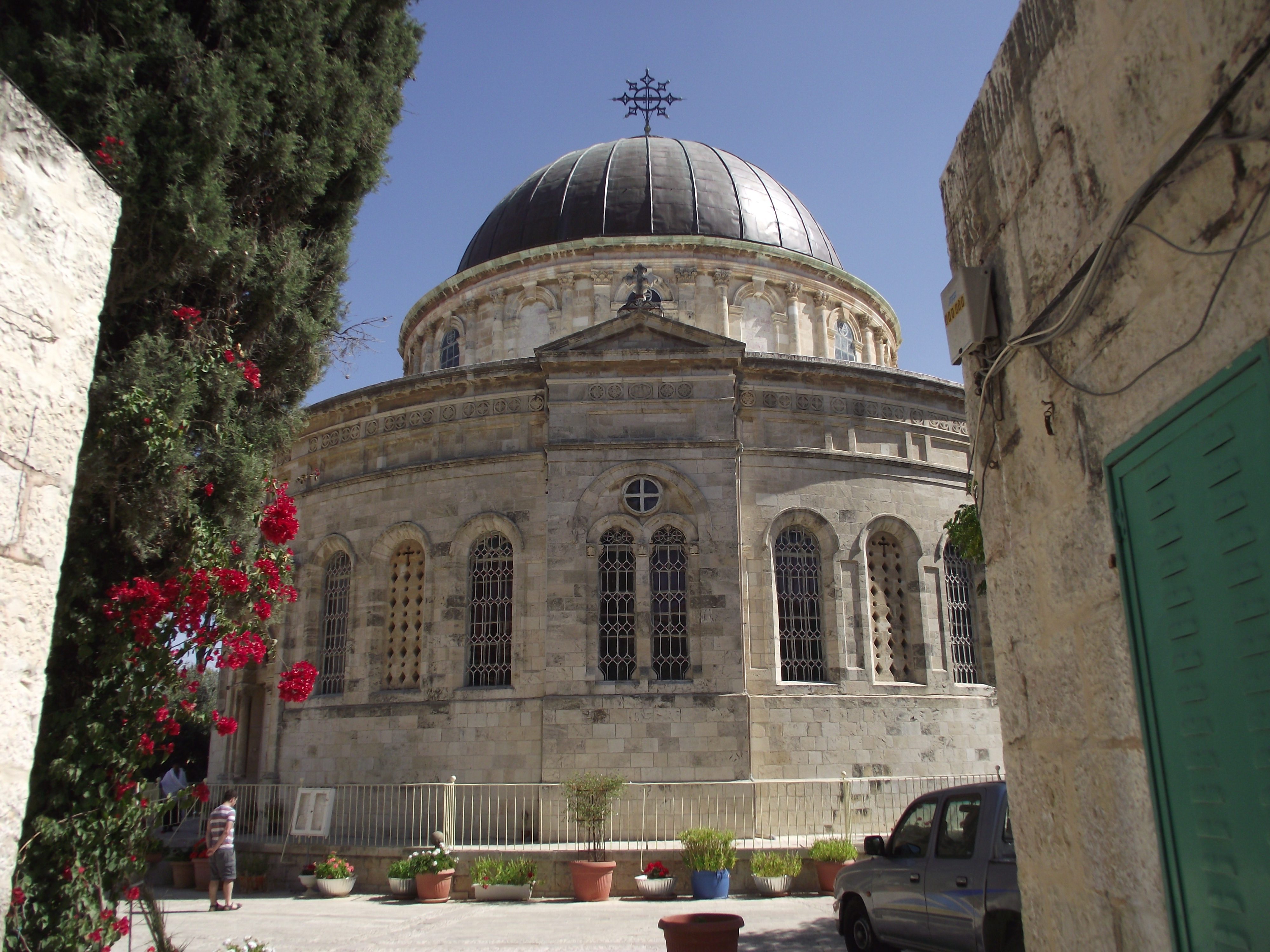 הכנסייה האתיופית או כנסיית קִידאנה מִהְרַת (ברית הרחמים) היא כנסייה שנבנתה ברחוב אתיופיה 10 בירושלים, במימון יוהנס הרביעי, קיסר אתיופיה. צורתה עגולה, הגג מכוסה בכיפה שחורה ועליה צלב אתיופי במרכזה. מעל לכניסות לגברים ולנשים מוצב תבליט של אריה וכתובת בשפות שונות.